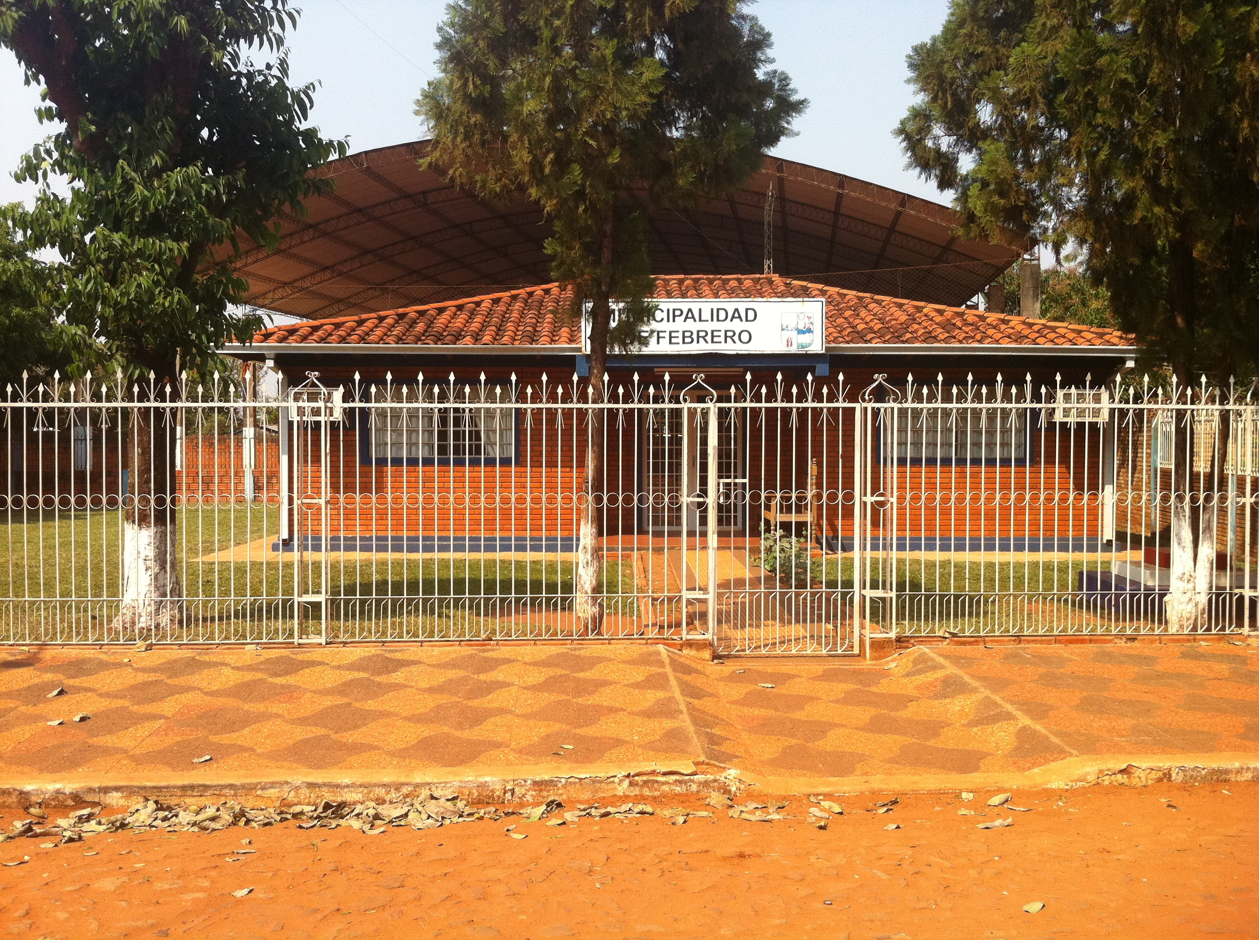 Municipalidad 3 de Febrero Paraguay